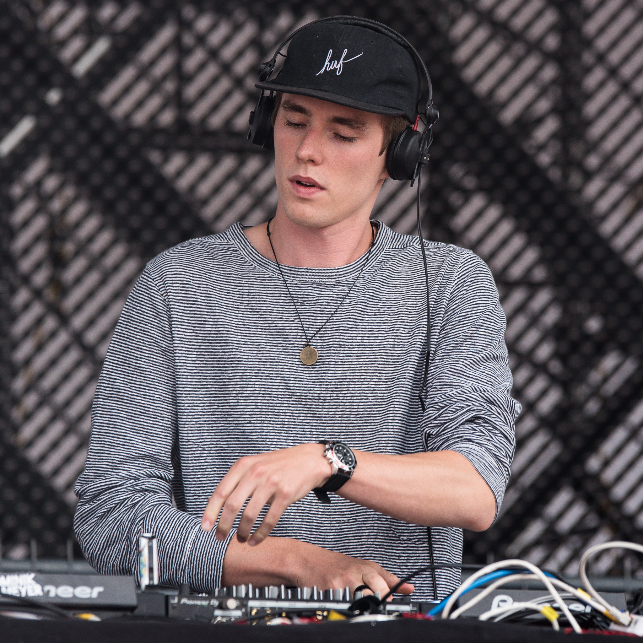 Festival,Konzert,Livekonzert,Livemusik,Lost Frequencies,Mainstage,Musik,Open Beatz 2016